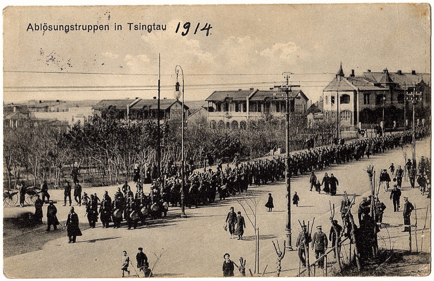 青岛中山路曲阜路路口西北侧德租时期